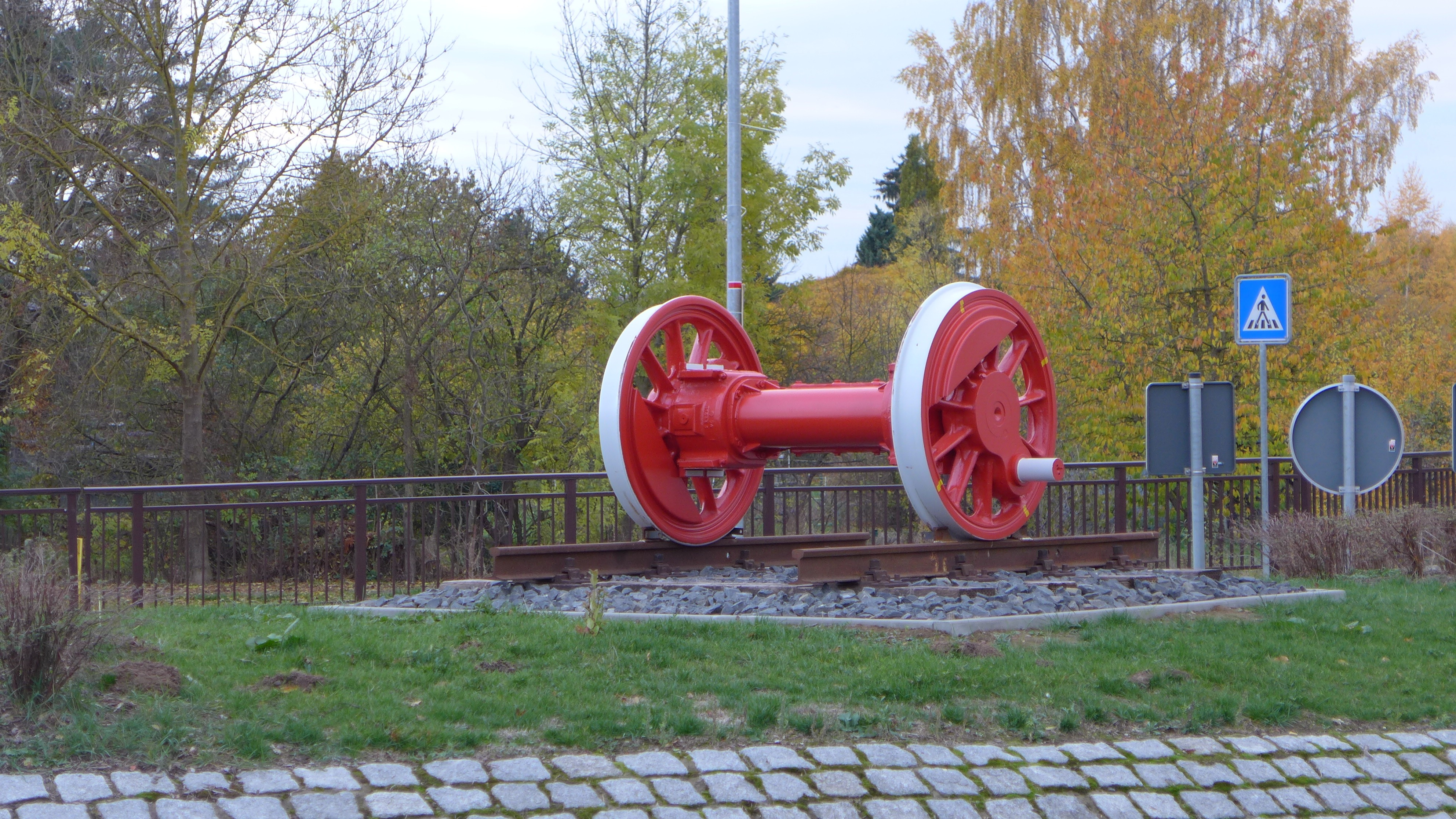 Das 2018 im Markoldendorfer Kreisel aufgestellte Denkmal erinnert an den nahen Bahnhof der Ilmebahn-Strecke Dassel - Einbeck. Das rote Objekt, das baugleich Teil einer Lokomotive auf dieser Strecke war, steht auf einem Stück Gleisjoch der ehemaligen Strecke und wiegt 2,7 Tonnen.